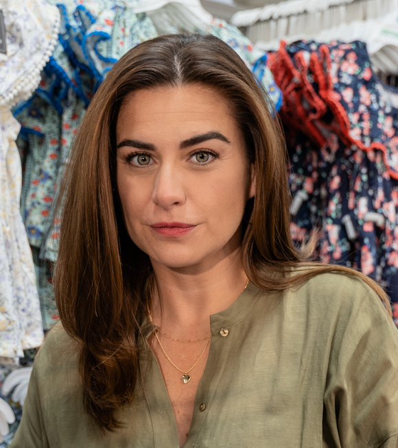 Ingriz Cruz durante la filmación de un comercial en 2018